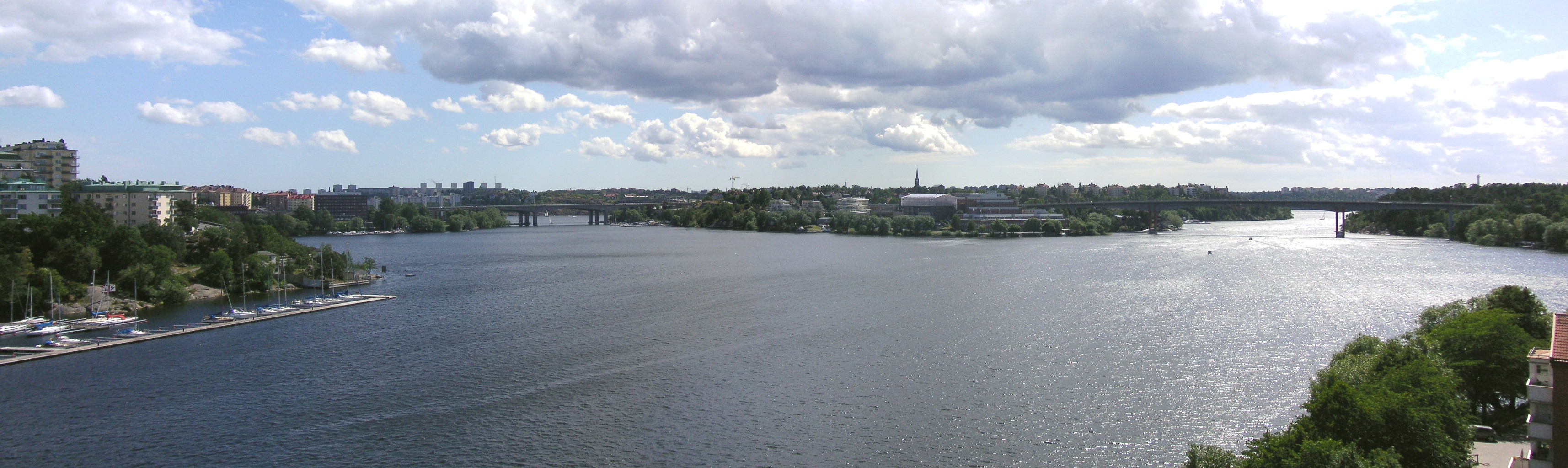 Essingefjärden i Stockholm, vy från Tranbergsbron